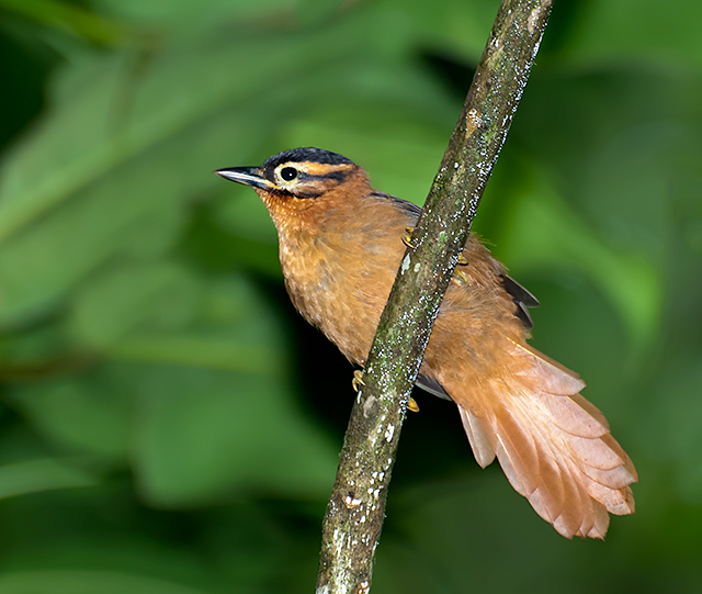 Registro-SP - Brasil